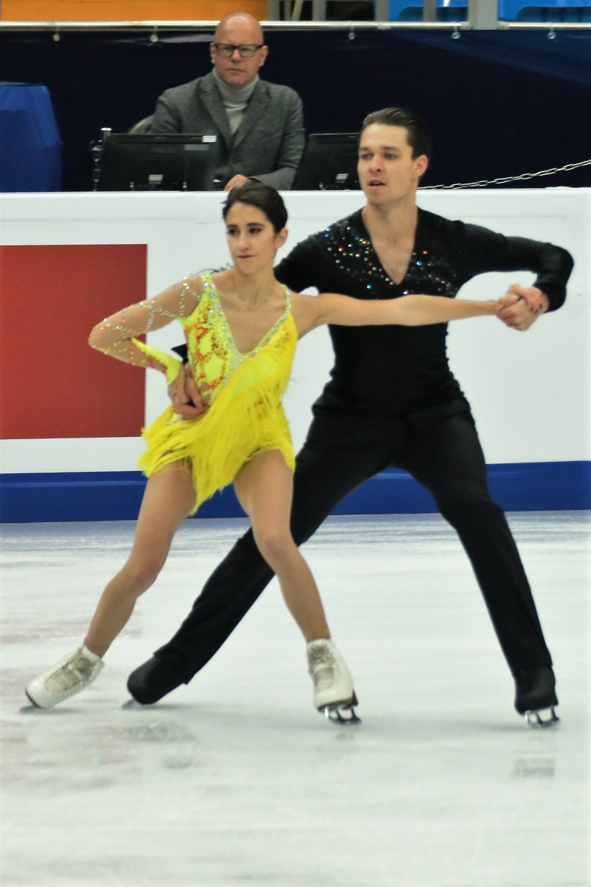 Кортни Мансур и Михал Чешка (Чехия) на Чемпионате Европы по фигурному катанию 2018